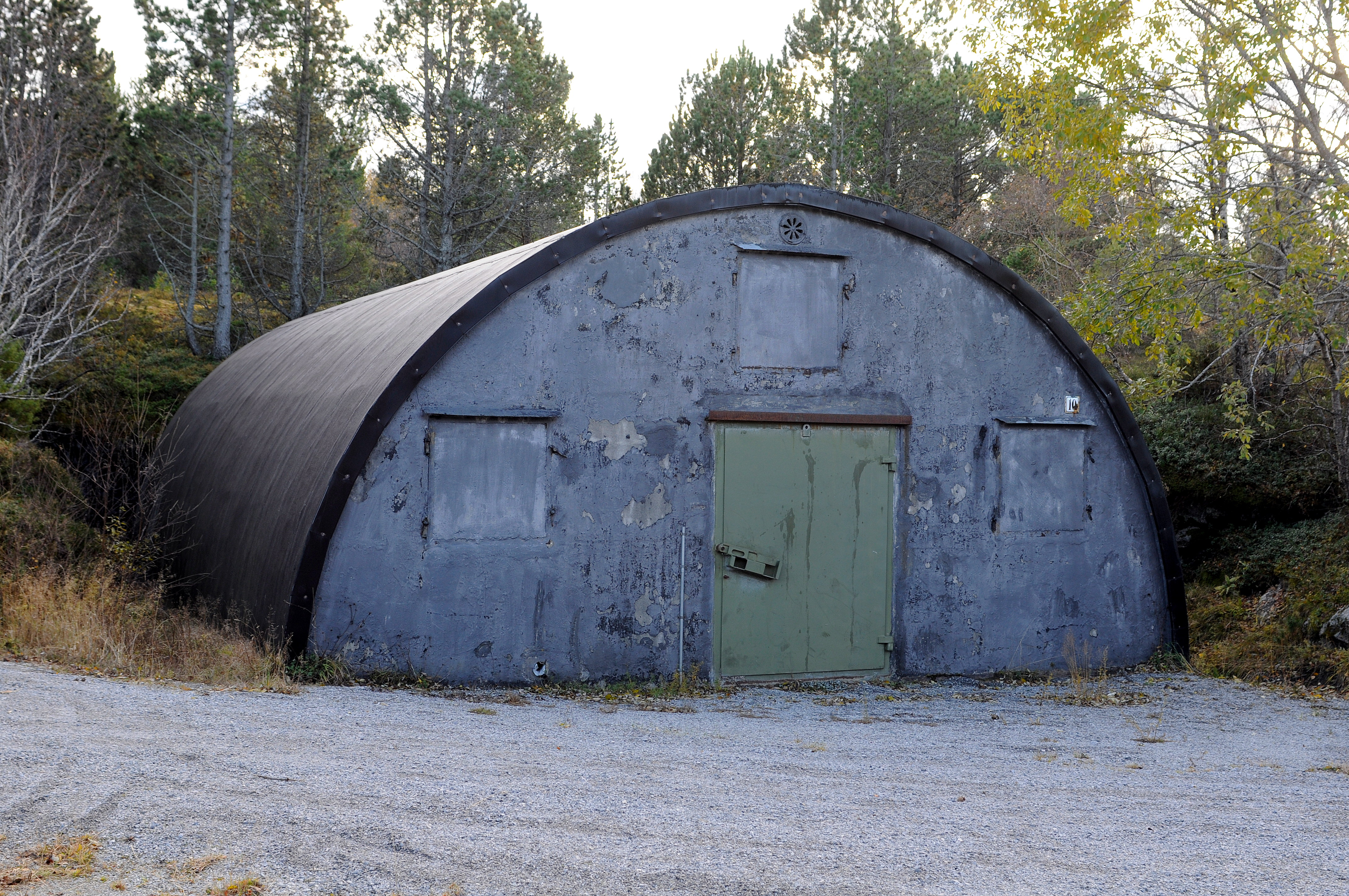 Moniermagasin ved Brettingen fort